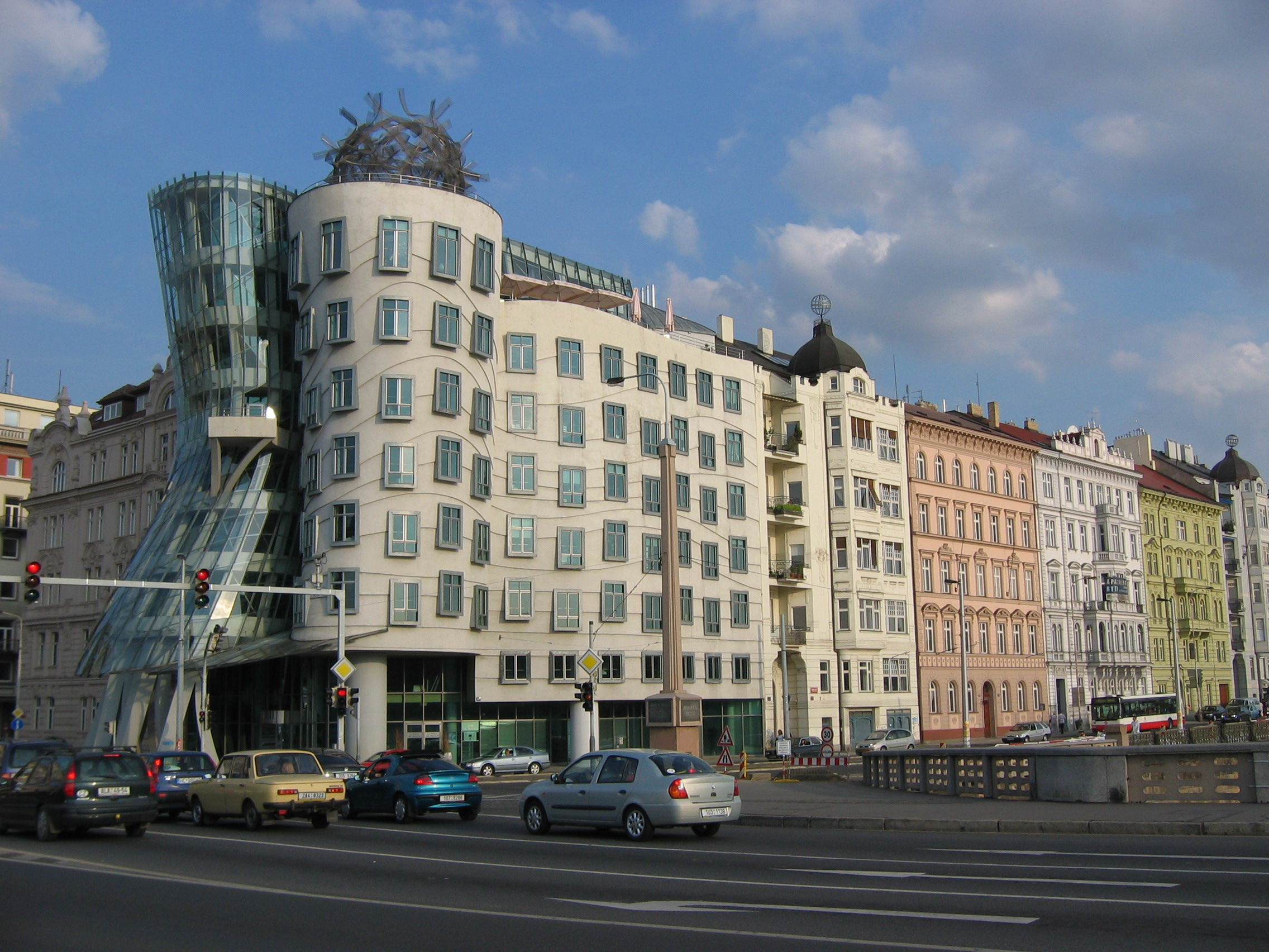 La Casa Danzante, tambíen conocida como Ginger and Fred, en Praga. Diseñada por el gabinete de arquitectos de Frank Gehry y Vlado Milunić.